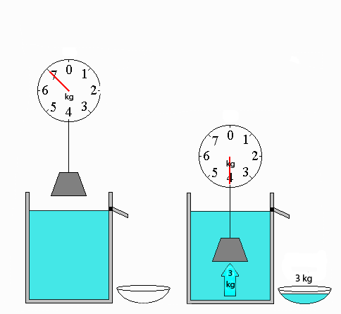 Teoria e Ligjit te Arkimedit